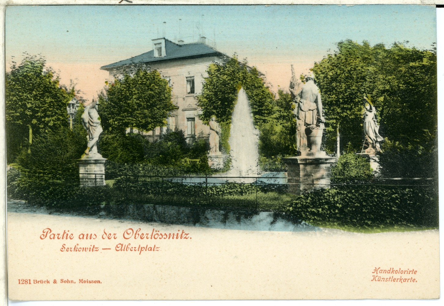 Serkowitz; Albertsplatz This postcard is from publisher Brück & Sohn in Meißen ( postcard has a unique number 01281 and is available in a higher resolution at the publisher. This images was uploaded in a cooperation project between Wikipedians and the publisher.